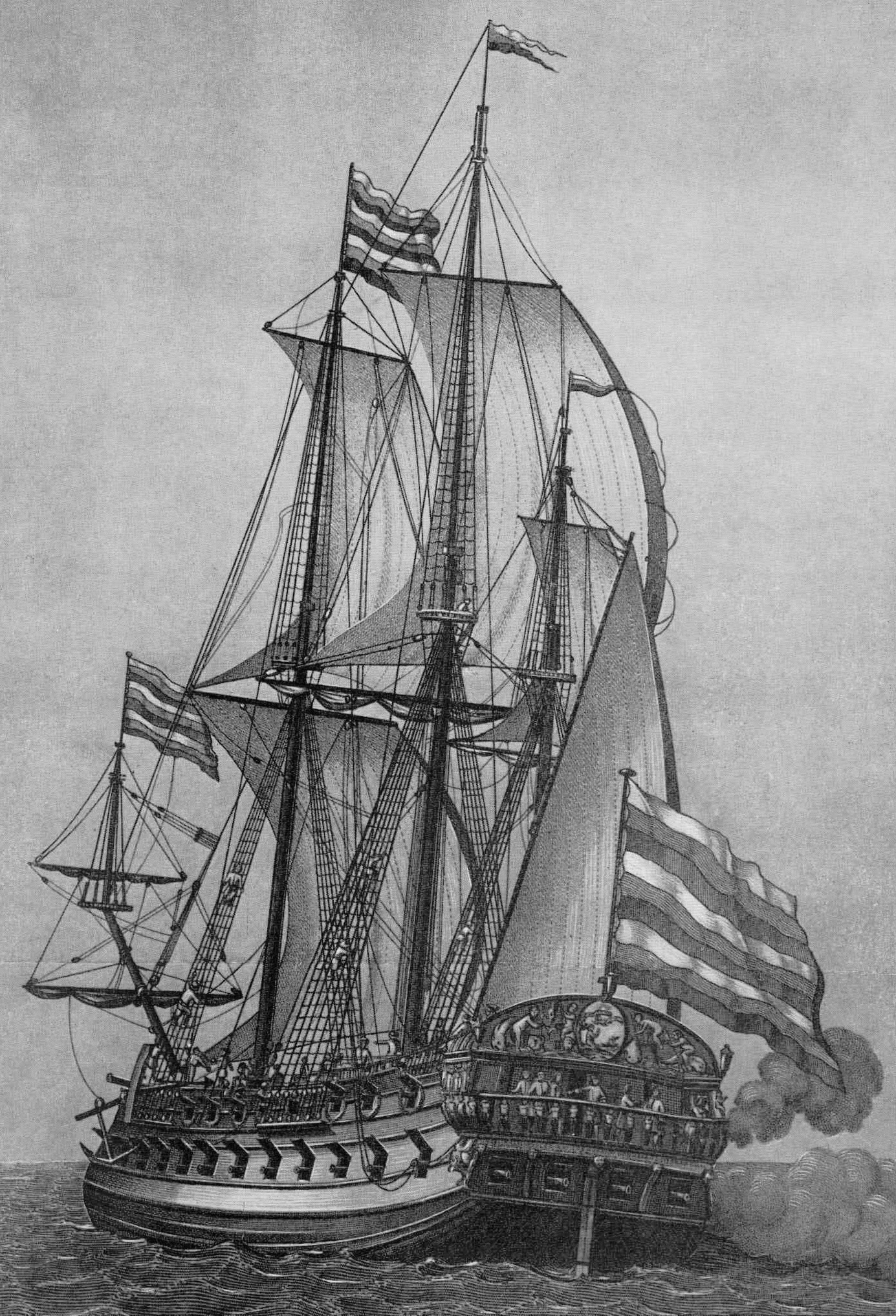 Гравюра, изображающая первый российский линейный корабль "Гото Предестинация". При торжественном спуске на воду на судне был поднят флаг, освящённый в Адмиралтейской церкви (бывшей Успенской церкви).